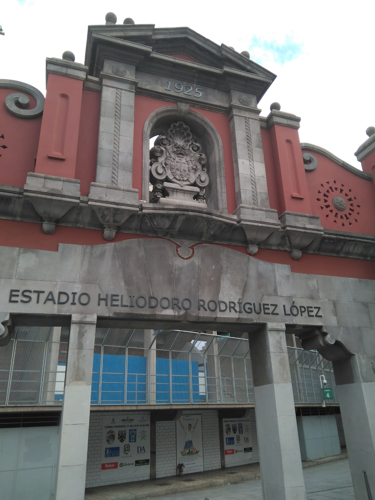 Vieja entrada del Estadio Heliodoro Rodríguez López